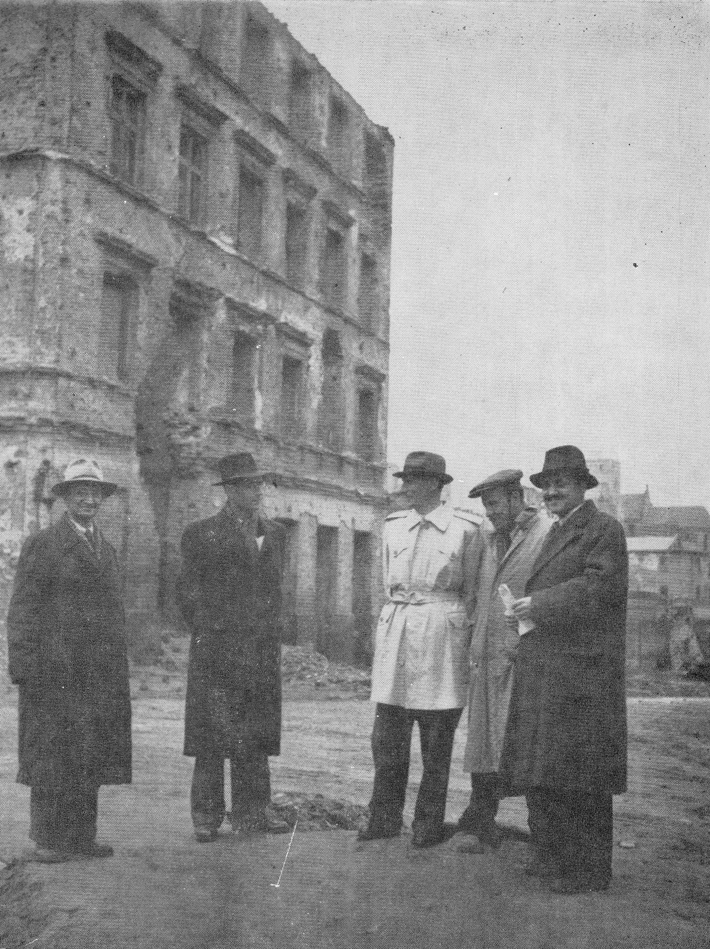 Grupa historyków i architektów na starym mieście w Warszawie. Stoją od lewej: Stanisław Żaryn, Aleksander Gieysztor, Stanisław Herbst, W. Zienkiewicz, Bohdan Guerquin